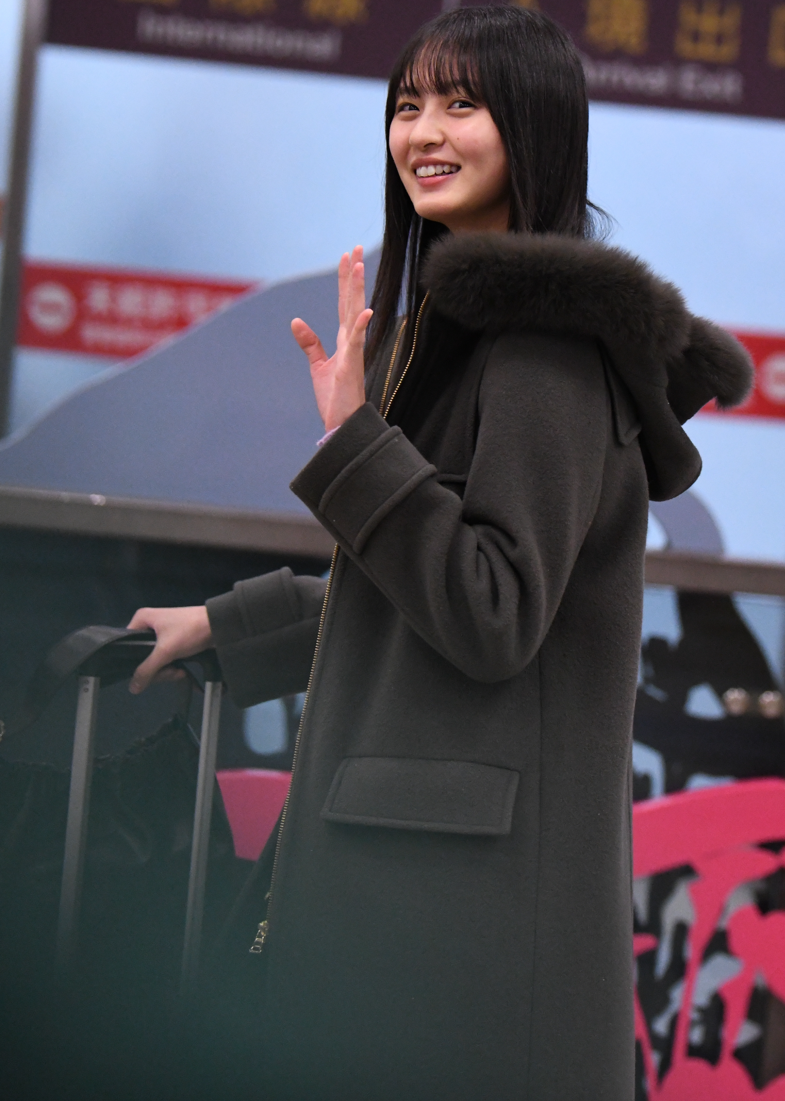 2020.01.18 乃木坂46「NOGIZAKA46 Live in Taipei 2020」抵達台灣@台北松山機場